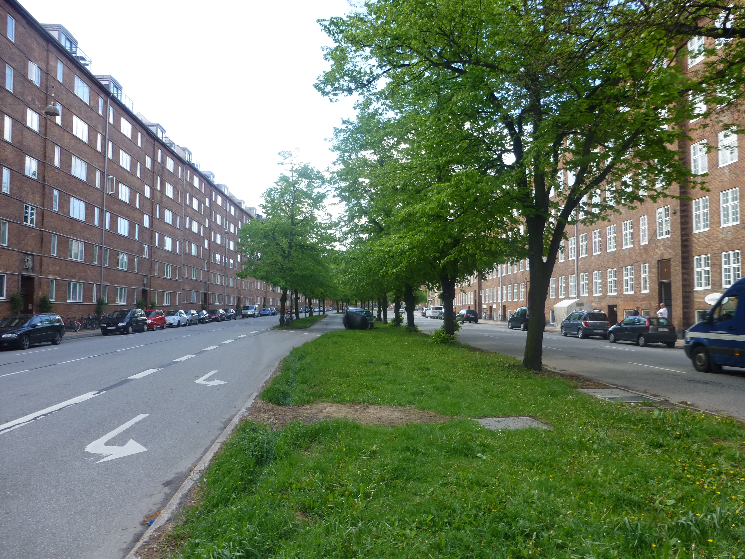 The street Strandboulevarden in Østerbro in Copenhagen.